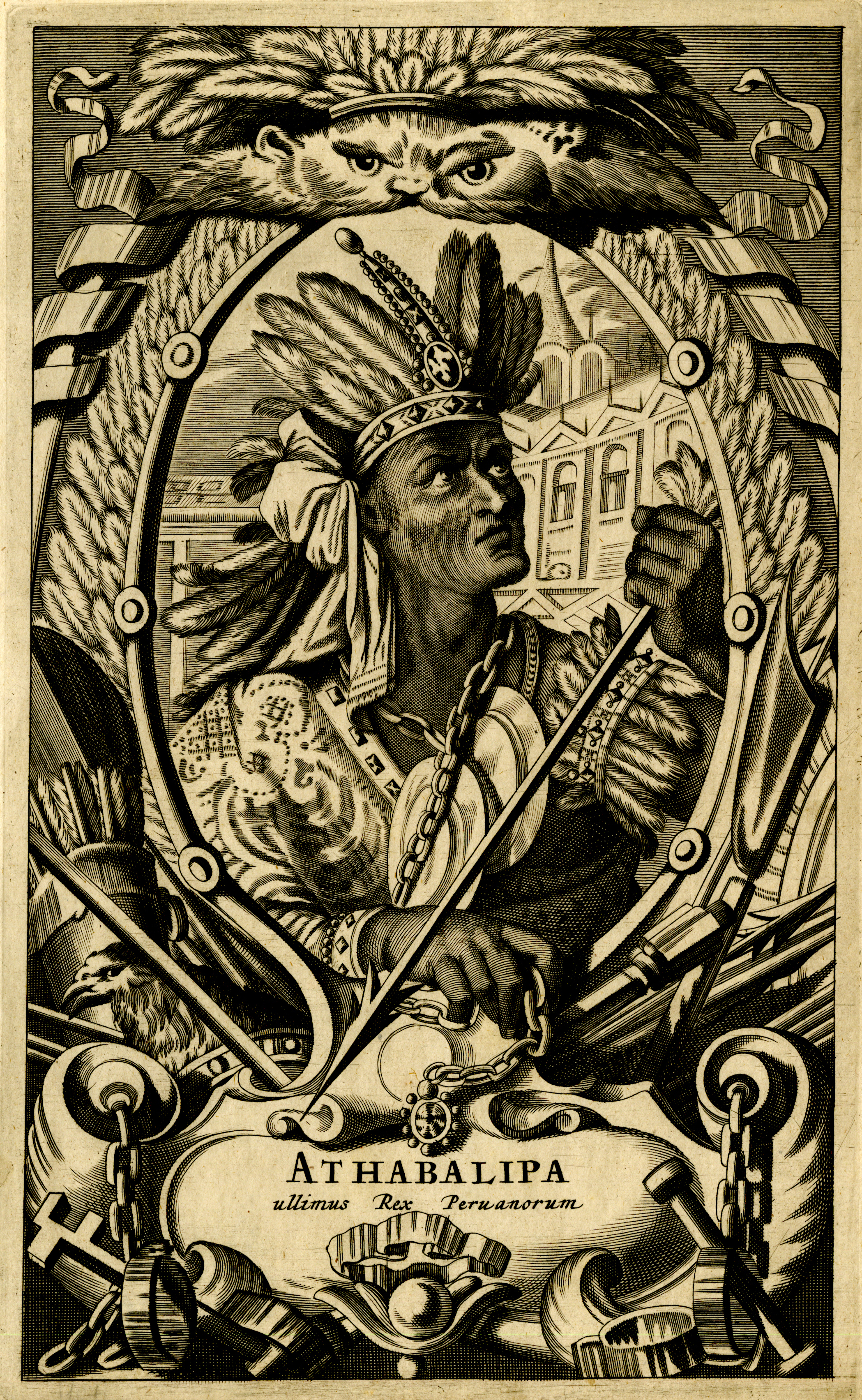 Diapositiva de Consulta y acceso publico cuya información fue investigada de un libro y/o ejemplar de revisión custodiado en los Fondos Bibliográficos y Cartográfico (Sección Siglo XVI o Etapa de la Conquista) del Archivo Histórico del Guayas; Guayaquil, Ecuador.Consultado y compartido por el usuario J. Javier García A.